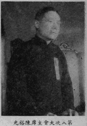 第一屆國民大會專輯圖片